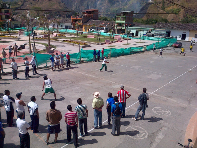 Personas jugando Chaza en San Juan de Pasto Colombia